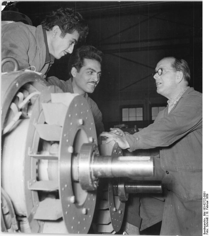 VEB Galvanotechnik Leipzig, griechische Arbeiter Zentralbild Schmiidt 18.2.1959 Freiheit für Manolis Glezos In einer Gruppenversammlung in VEB Galvanotechnik Werk II in Leipzig forderten die griechischen und deutschen Arbeiter die Abteilung Großmontage Freiheit Manolis Glezos. Die griechischen Arbeiter in der Deutschen Demokratischen Republik verlangen gemeinsam mit ihren deutschen Arbeitskollegen die unverzügliche Freilassung dieses heldenhaften Patrioten. Sie wollen auch durch gute Arbeit diese Forderung bekräftigen. UBz: Im VEB Galvanotecknik in Leipzig Werk II waren es die griechischen Arbeiter Konstantinidis und Dellas, die in Verbindung mit der Parteiorganisation des Werkes in der Abteilung Großmontage die Seifert-Methode eingeführt haben. - (V. l. n. r. ) Konstantinidisn und Dellas mit dem deutschen Meister Buckowitz.